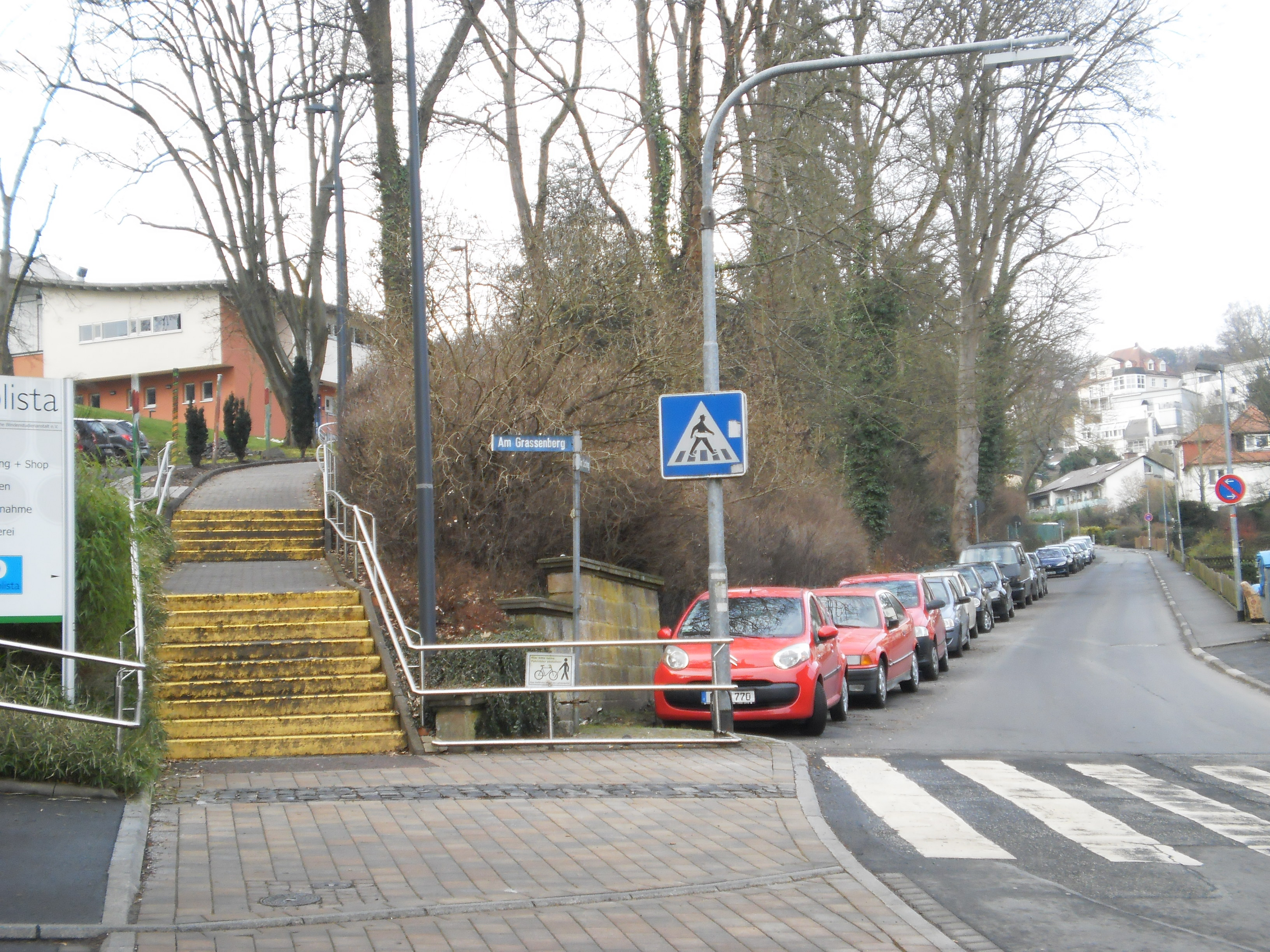 Straße Am Grassenberg (nach links) und Am Schlag (aufwärts) mit Zebrastreifen vor der Blindenstudienanstalt (blista) in Marburg im Februar 2016. Ungewöhnlich ist die Beibehaltung eines Zebrastreifens in einem sonst verkehrsberuhigten Gebiet, soll jedoch hier vermutlich den blinden Schülerinnen und Schülern das praktische Einüben für das Gehen auf der Strasse ermöglichen. Links im Bild, vor der Treppe hoch zu den Schulgebäuden, ist vom Zebrastreifen her ein Streifen mit Kopfsteinpflaster im Bodenbelag zu erkennen, welcher ebenfalls bei der Orientierung an dieser Querungsstelle hilft. Am Geländer zur Treppe sollen Fahrräder nicht angeschlossen werden: Ein dezentes Schild mit "Hier bitte keine Fahrräder abstellen!" weist mit relativ kleiner Schrift darauf hin, was für Sehbehinderte, bei Dunkelheit oder bei mangelnder Aufmerksamkeit leicht übersehen werden kann. Gleich direkt hinter dem Geländer parken Autos auf der linken Strassenseite, nicht jedoch Fahrräder.